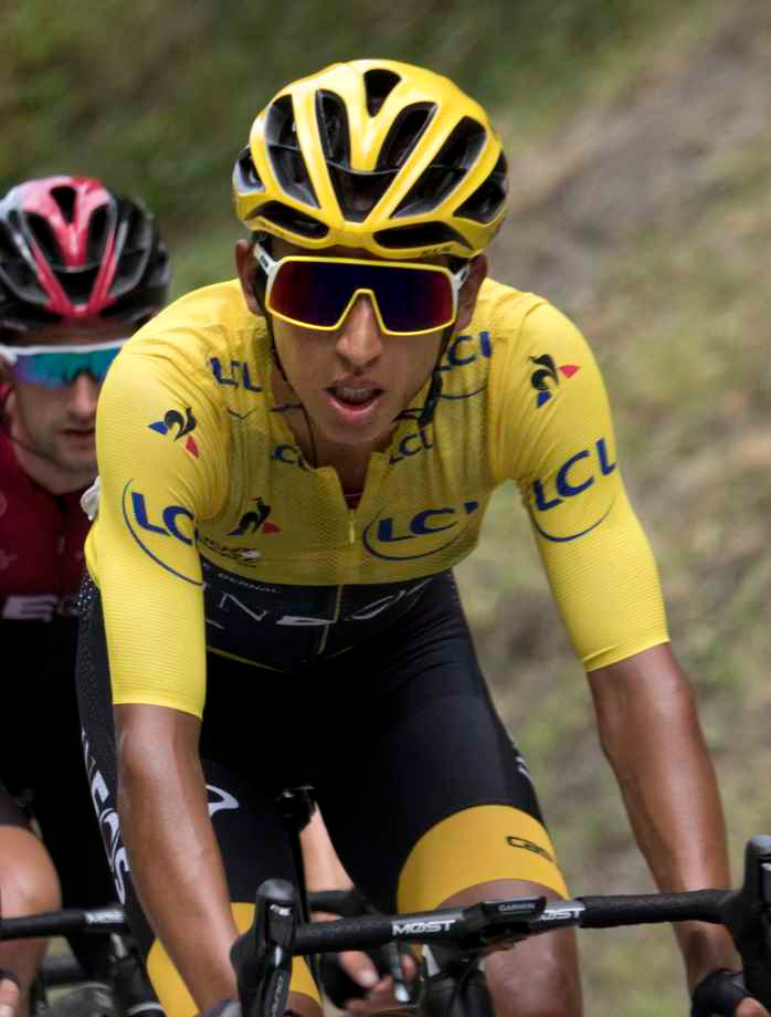 ALP20240 bernal